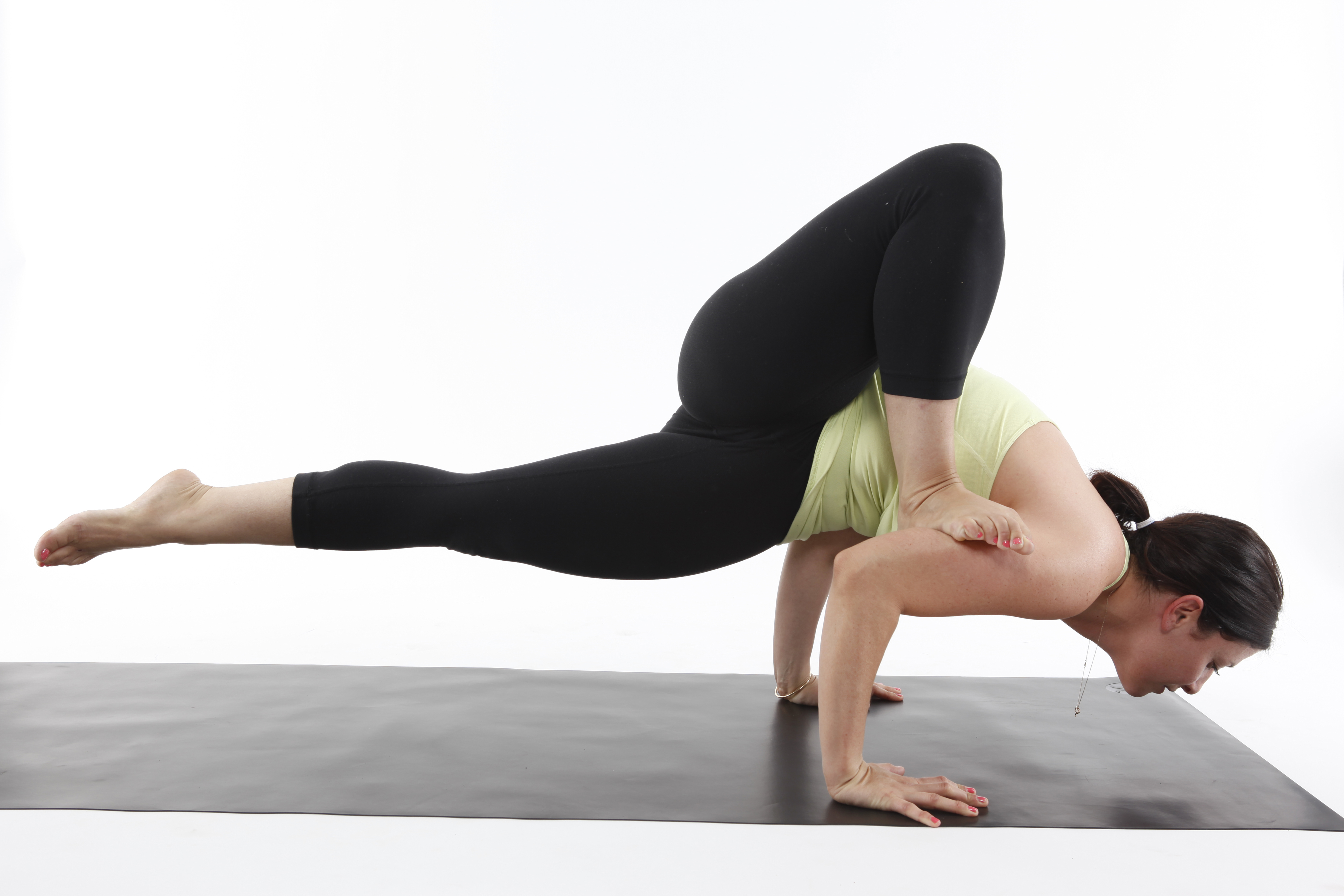 variant of Kaundinyasana